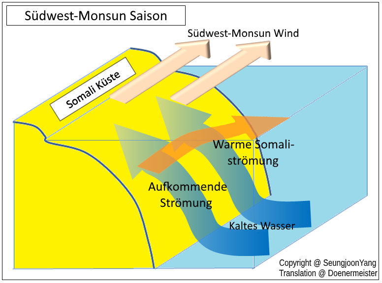 Strömung von Somalia